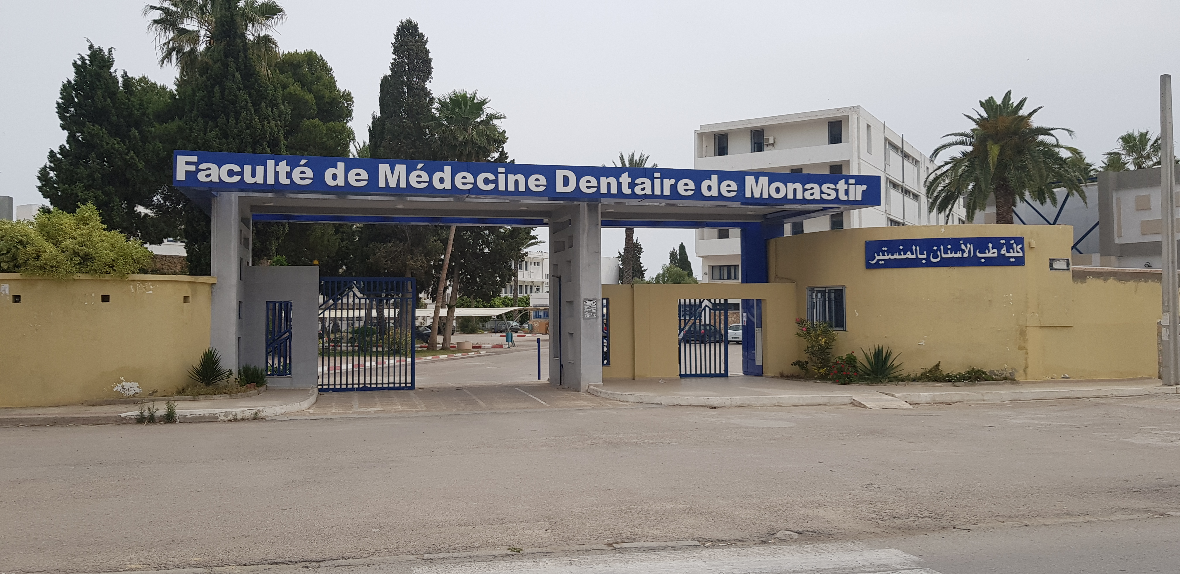 nouvelle entrée de la Faculté de médecine dentaire de Monastir (FMDM) à l'avenue Taher Haddad